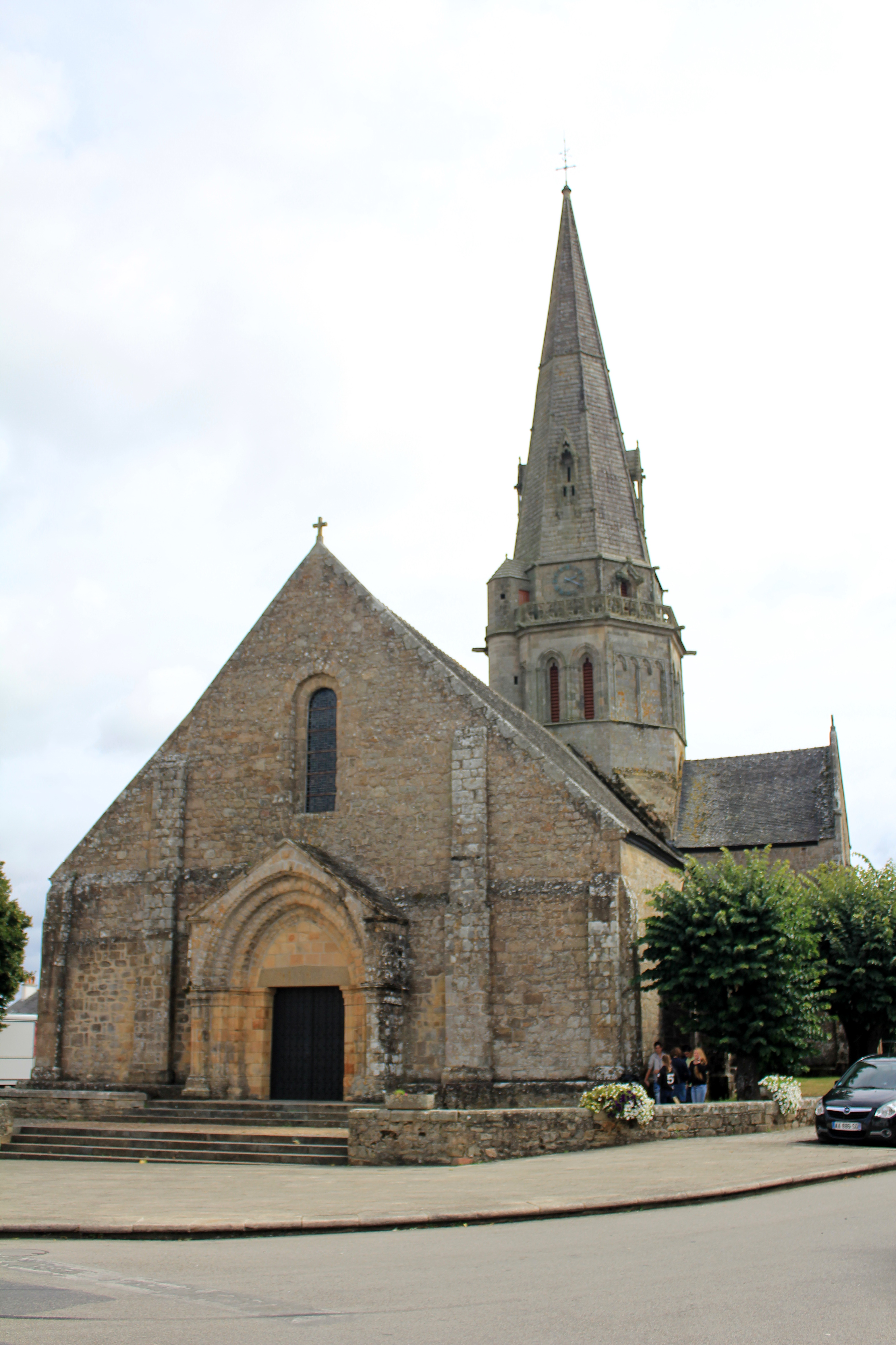 Église Notre-Dame-de-Joie de Merlevenez, France. Vue générale sud -ouest .